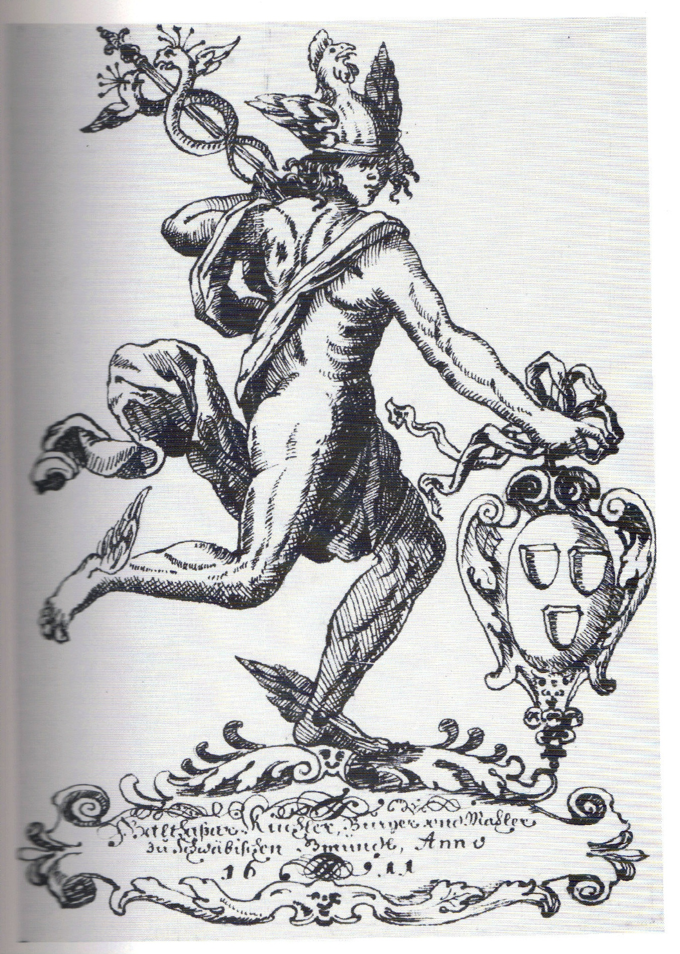 Handzeichnung des Götterboten Merkur, beigegeben dem Exemplar der "Repraesentatio" Landesbibliothek Stuttgart Ra 17 Kue 1